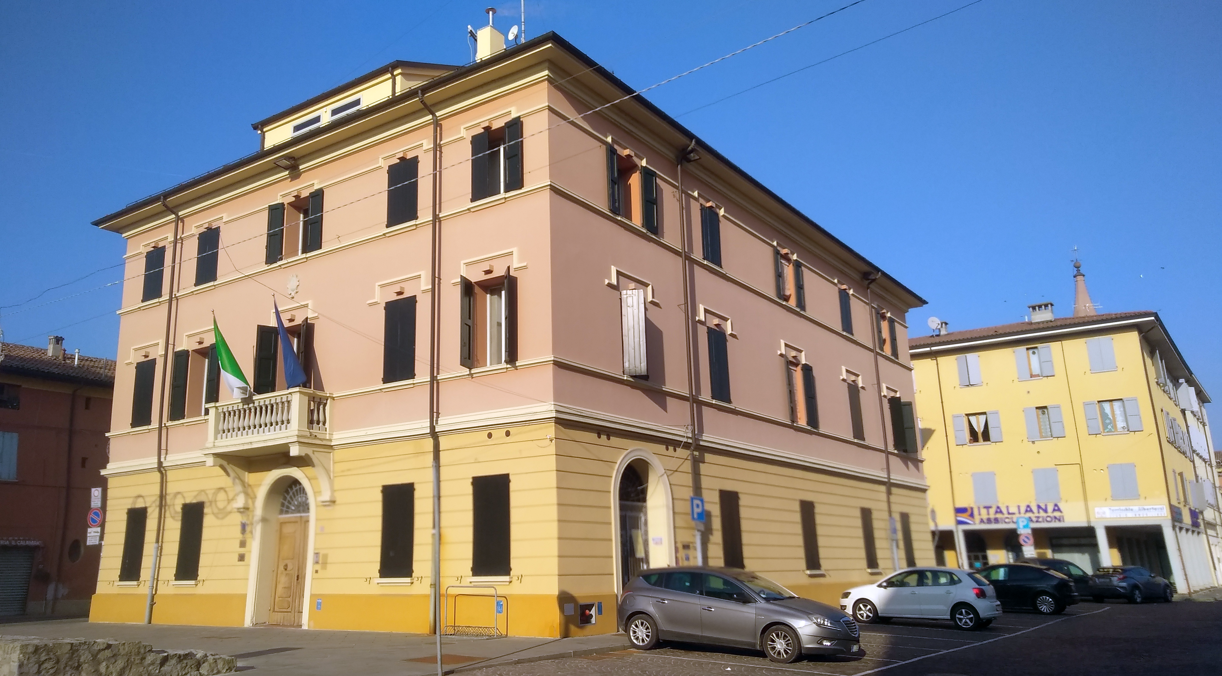 Crespellano (Valsamoggia, BO) - il municipio